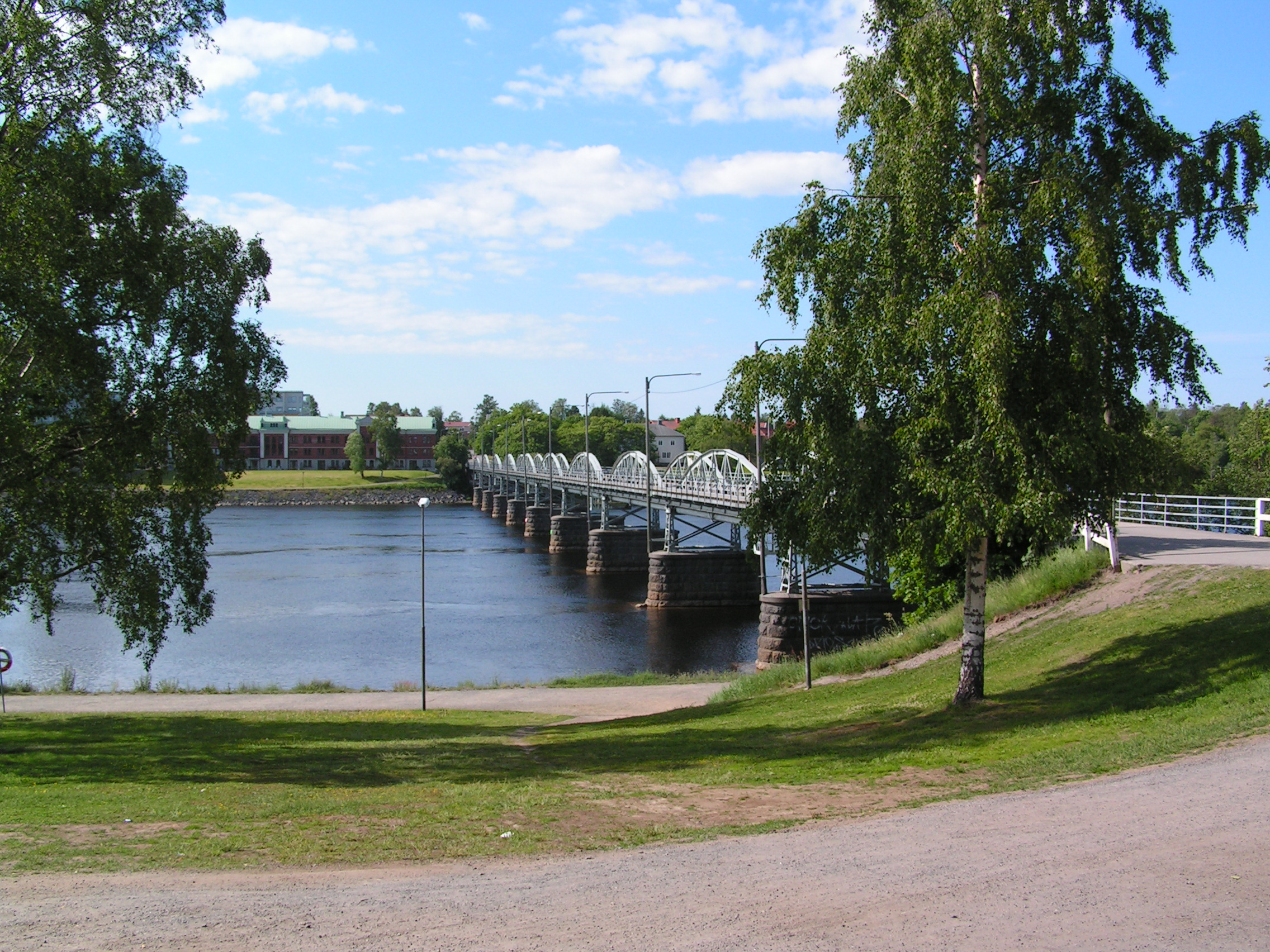 Gamla bron i Umeå (Old Bridge of Umeå, Sweden)